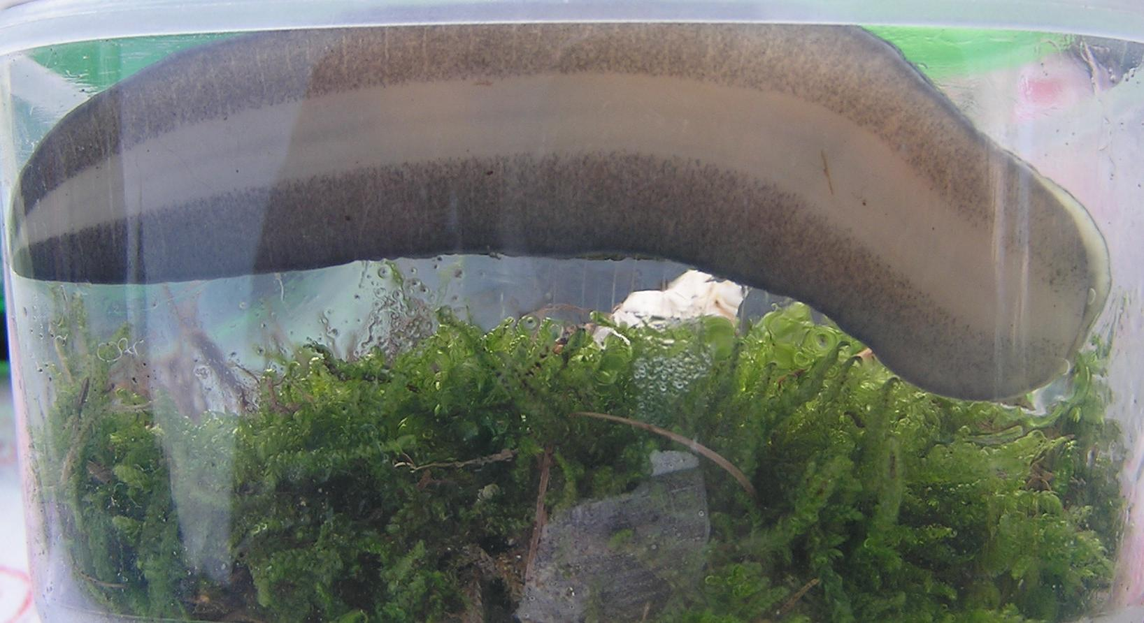 Beschreibung: Limax cinereoniger Bottomside Quelle: selbst fotografiert Fotograf: Clemens M. Brandstetter, Buers Ort & Datum: Südtirol, Seiseralm, Sommer 2005 Lizenz: GNU-FDL